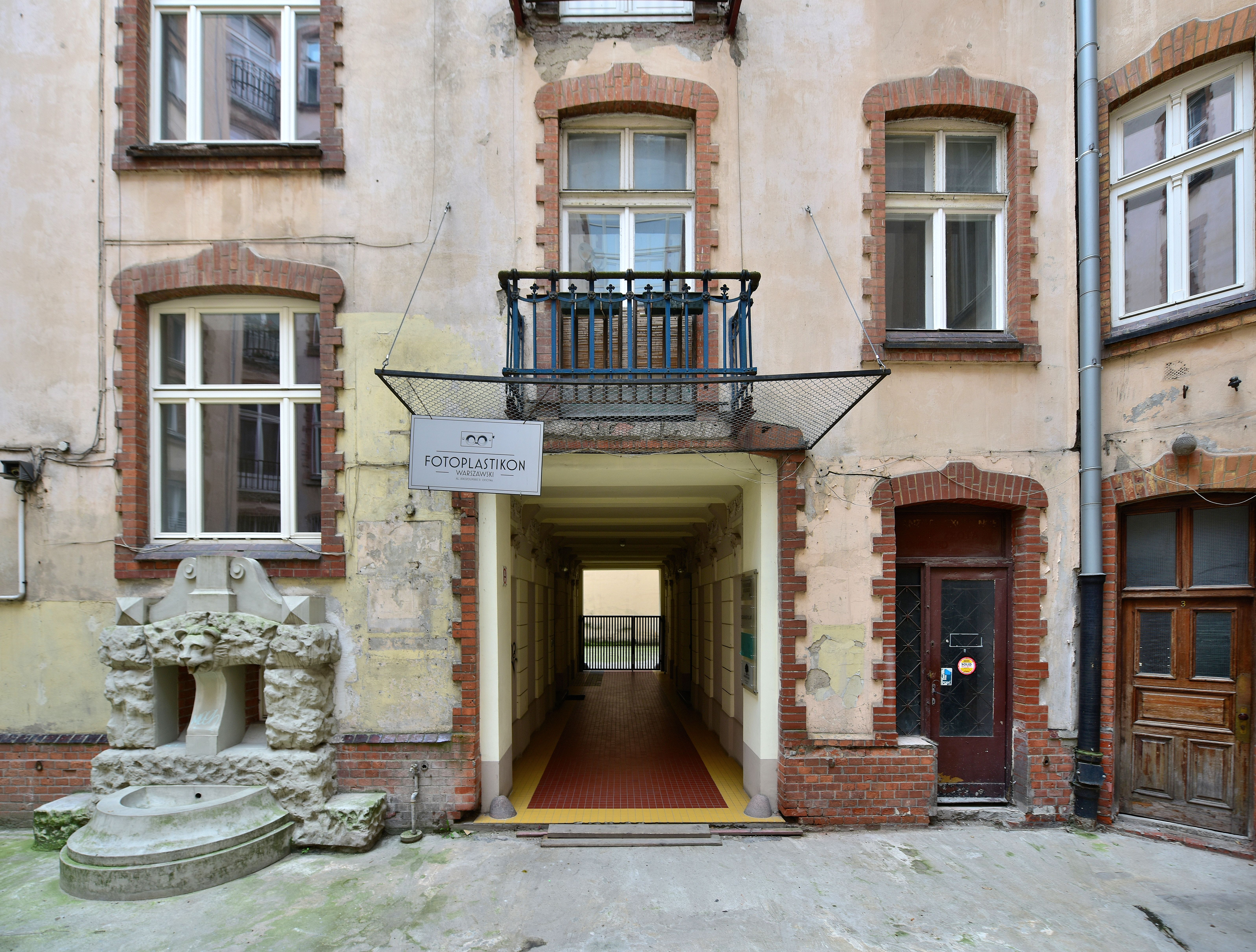 Kamienica Hoserów przy Al. Jerozolimskich 51 w Warszawie